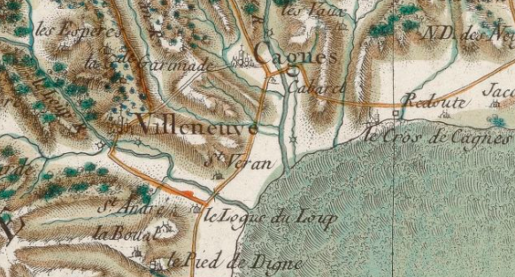 Emplacement du prieuré de Saint-V"eab du Loup sur la carte de César-François Cassini (feuille N°169 publiée en 1780). Ce prieuré était une filiale de l'Abbaye de Lérins. Il était en ruine à l'époque du relevé de cette carte et personne n'est capable, aujourd'hui d'indiquer quel était son emplacement exact.